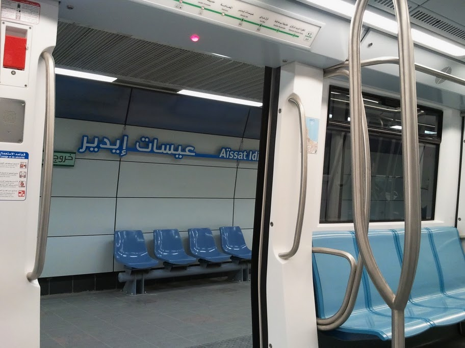 Métro d'Alger, Station Aïssat Idir